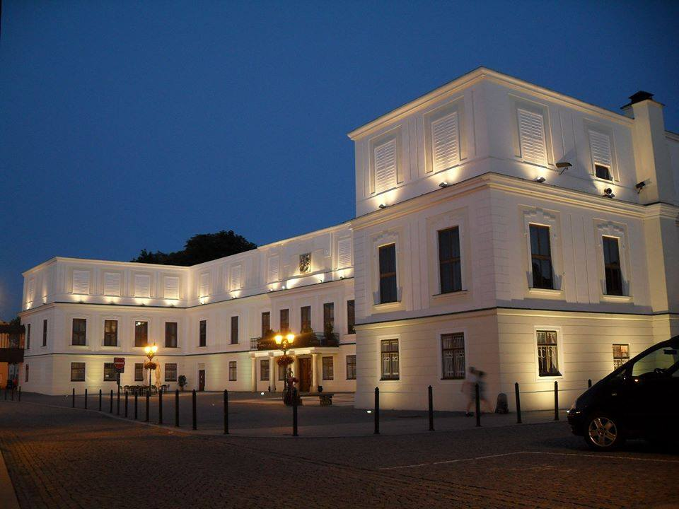 Hlavní budova zámku